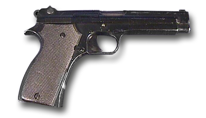 Pistole Modell 1935